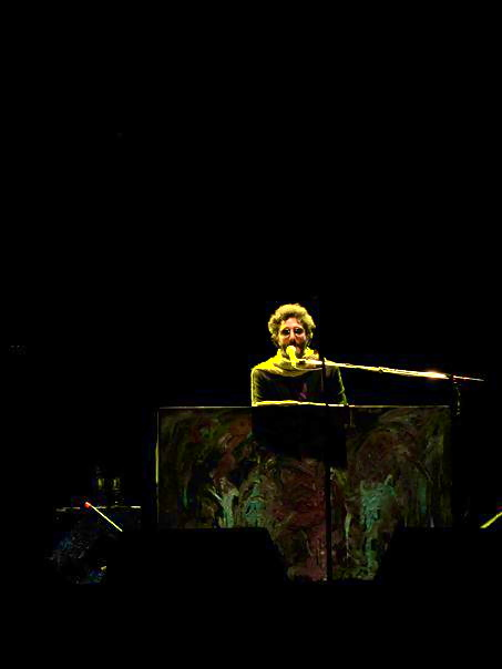 Concierto Fito Paéz, Festival de las Almas 2010